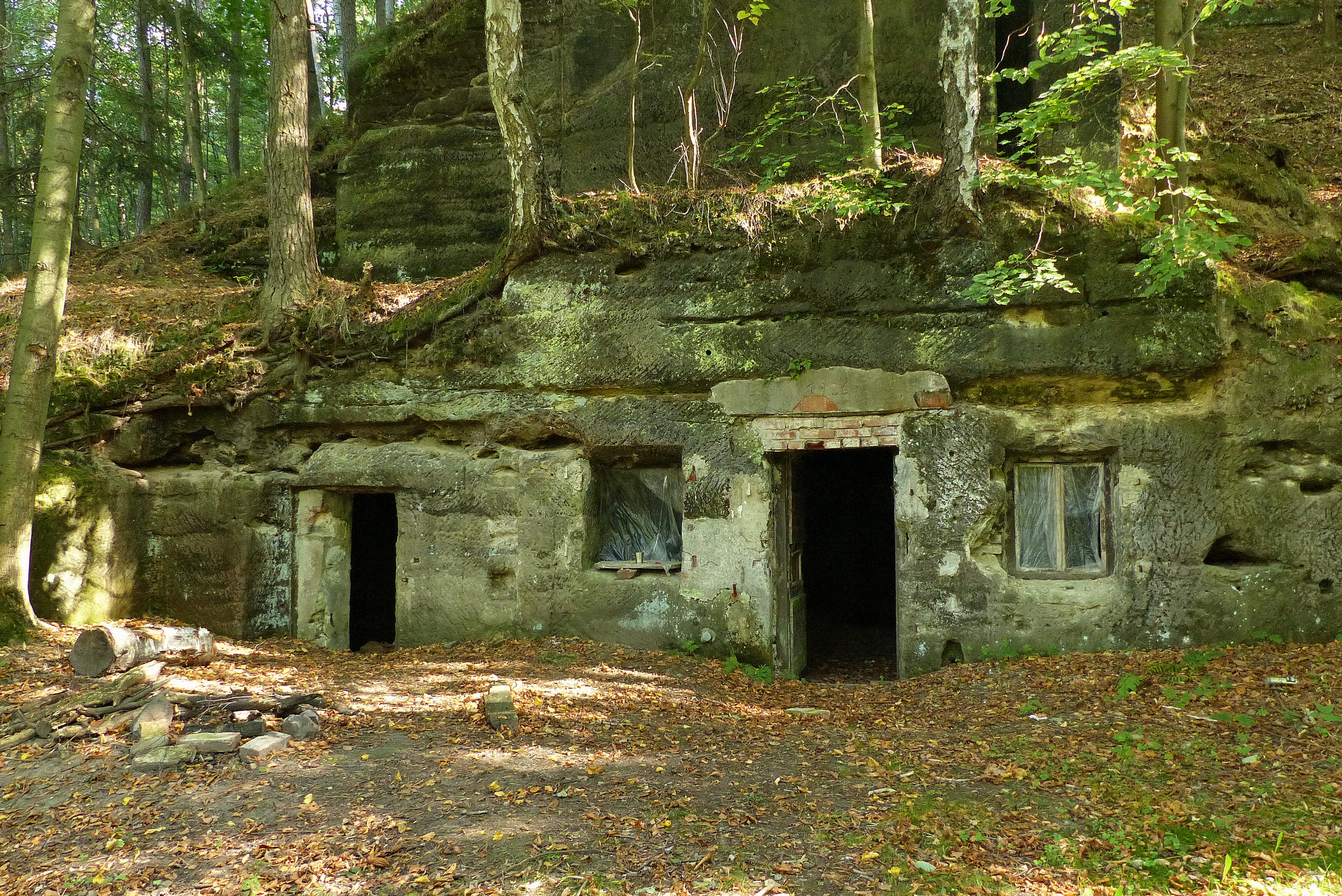 Skalní místnosti v bývalých Holičkách